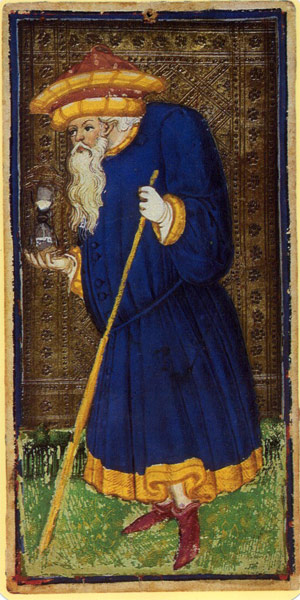 Visconti-Sforza tarot deck. Hermit